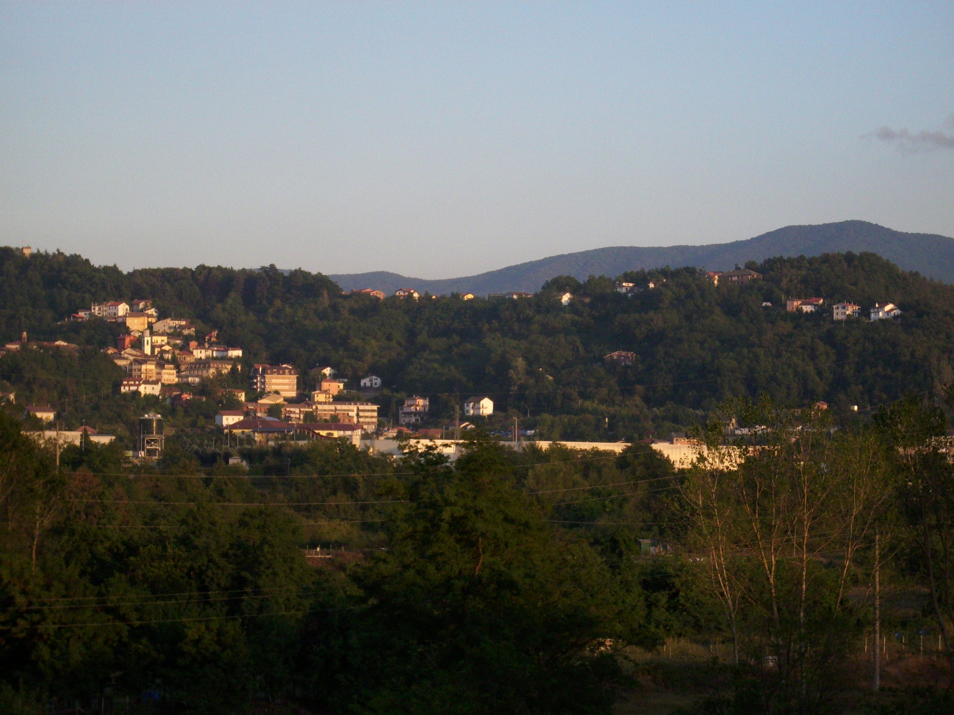 Belforte Monferrato fotografato da Ovada.